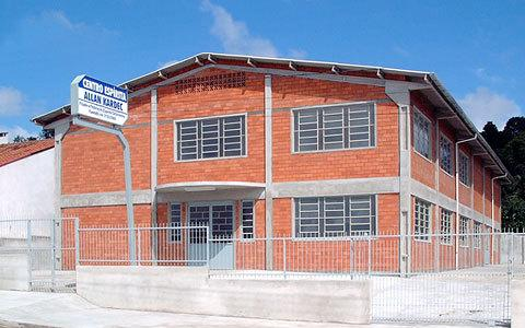 Bâtiment principal du centre spirite Allan Kardec de Santa Catarina (Brésil).